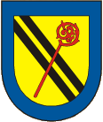 znak obce